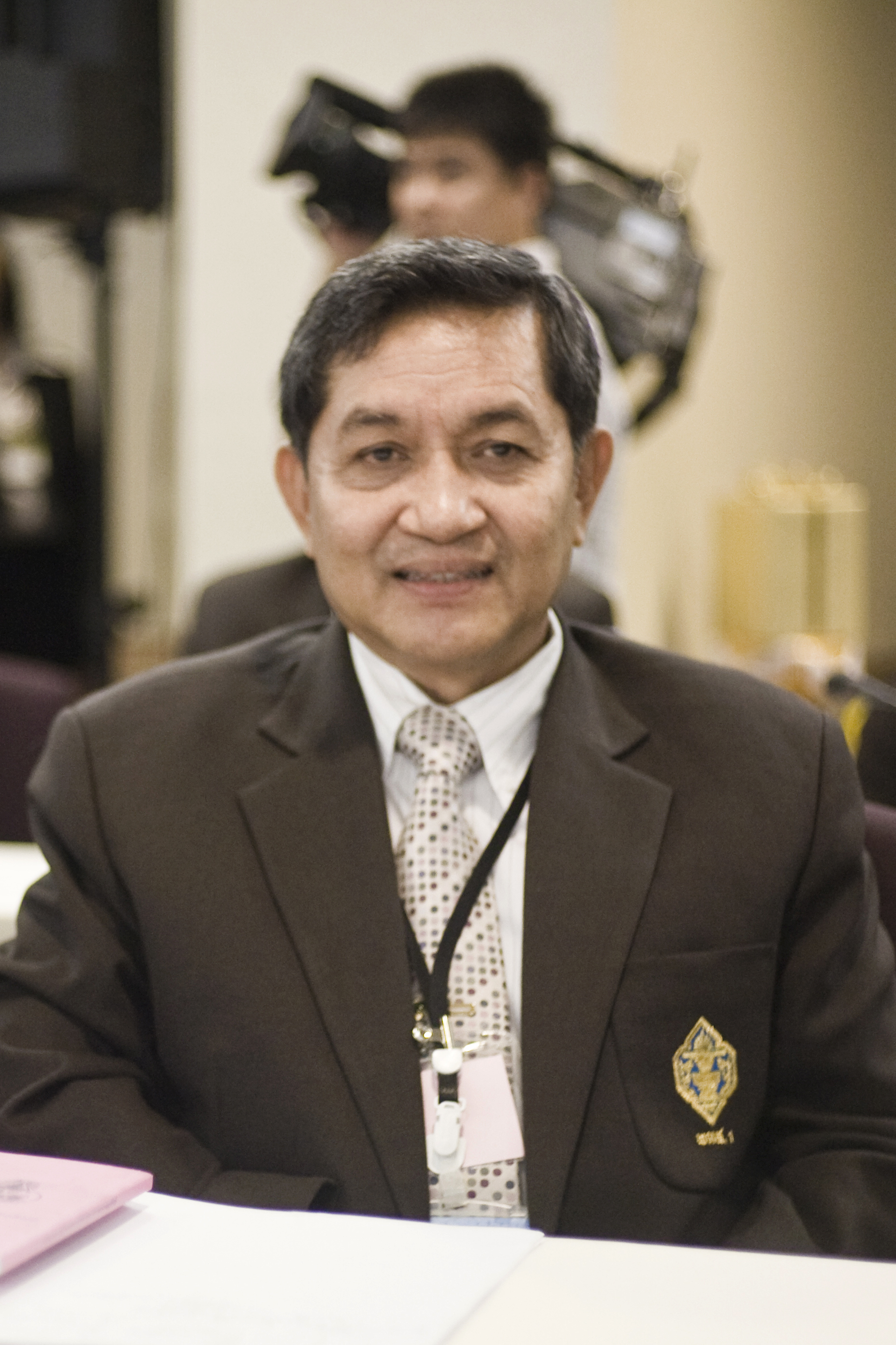 สนธิ บุญยรัตกลิน หลักสูตร การพัฒนาการเมืองและการเลือกตั้งระดับสูง รุ่นที่ 1 ประจำปี 2552 ณ สถาบันพัฒนาการเมืองและการเลือกตั้ง ห้อง 704 สำนักงานคณะกรรมการการเลือกตั้ง ชั้น 7 ศูนย์ราชการเฉลิมพระเกียรติฯ อาคารบี ถนนแจ้งวัฒนะ กรุงเทพฯ 31สิงหาคม2552 (The Official Site of The Prime Minister of Thailand Photo by พีรพัฒน์ วิมลรังครัตน์)